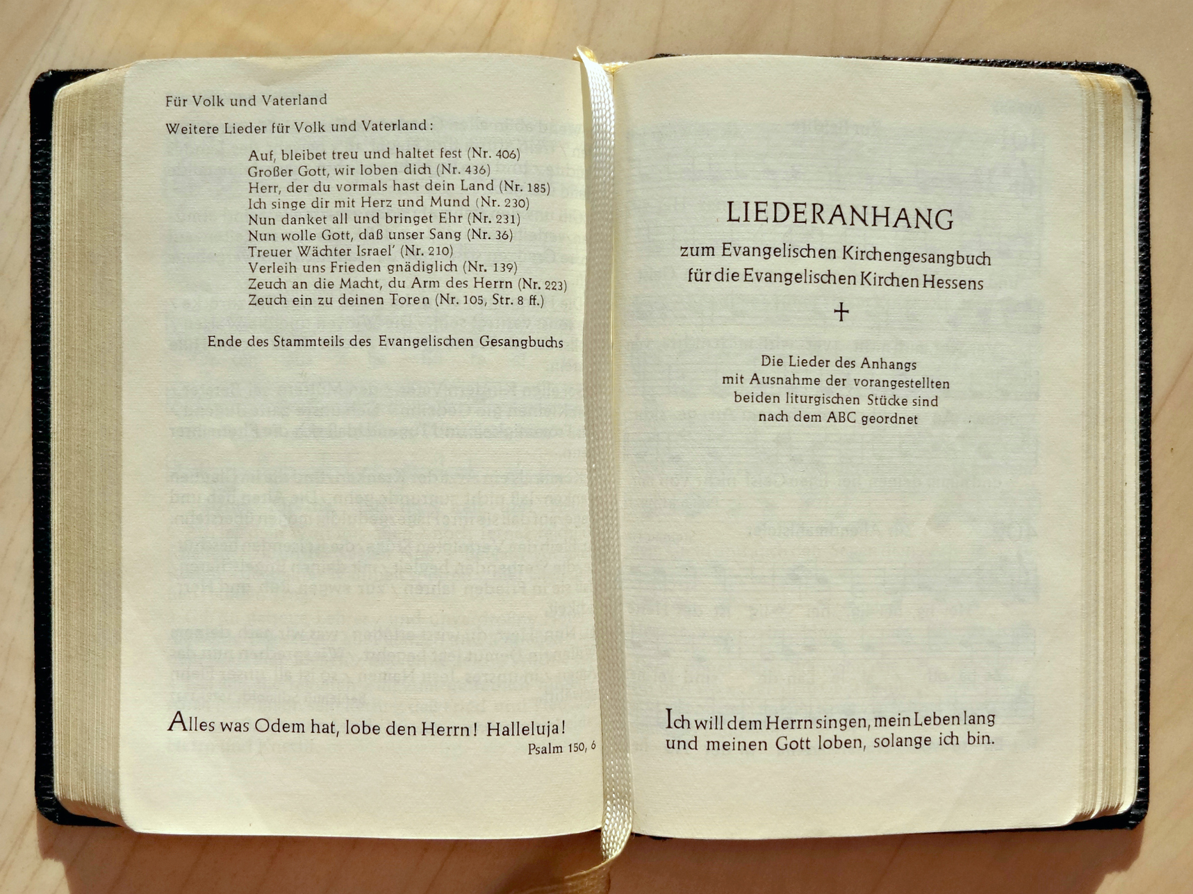 Verlag der Evangelischen Kirche in Hessen und Nassau: Der Herr ist mein Hirte, Gesangbuch, Evangelisches Kirchengesangbuch für die Evangelische Kirche in Hessen und Nassau, 17. Auflage, Herausgegeben auf Beschluß der Ersten Kirchensynode der Evangelischen Kirche in Hessen und Nassau vom 14. April 1950, Darmstadt, 1962